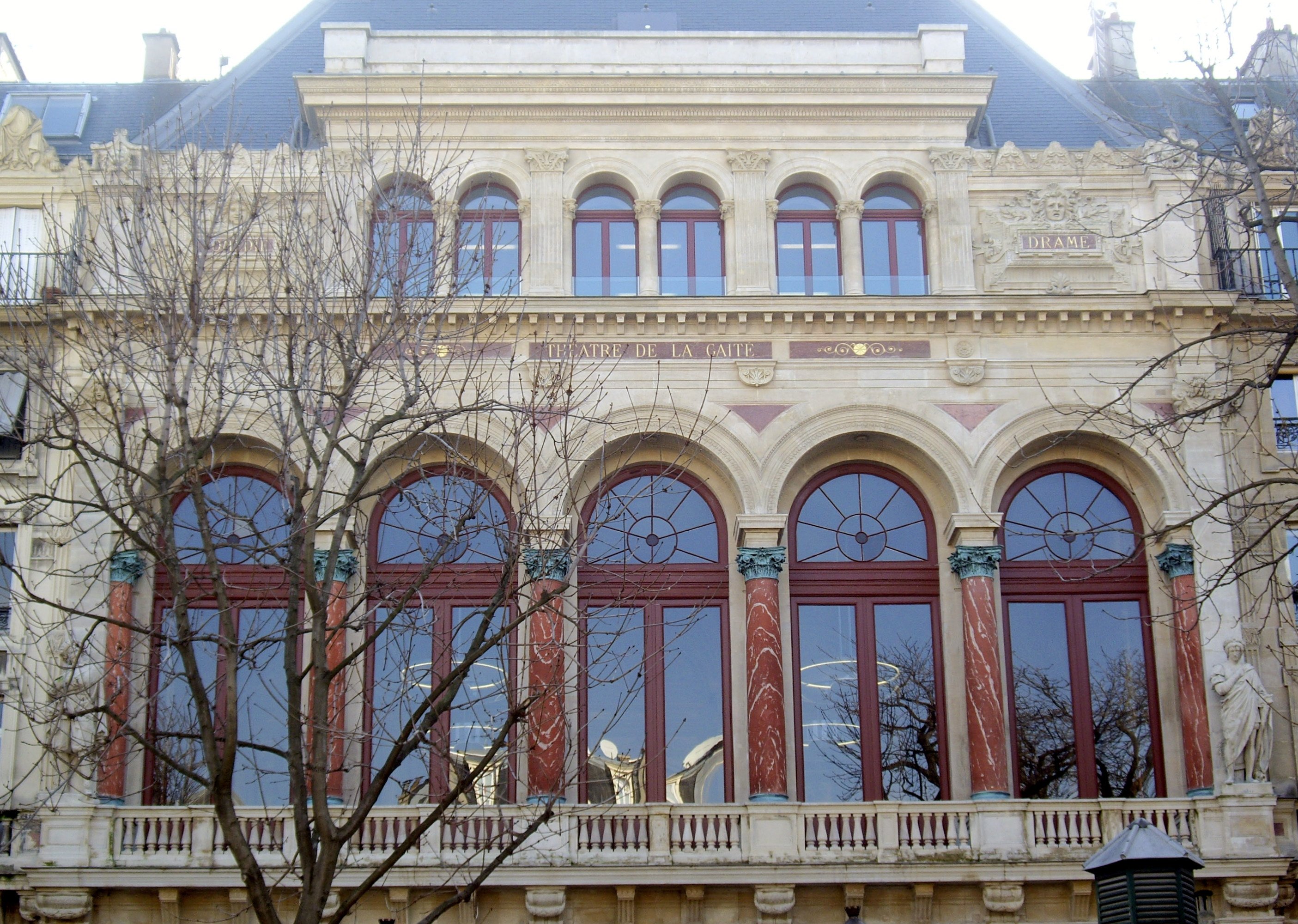 Théâtre de la Gaîté, 3 bis rue Papin, Paris 3e. Partie supérieure de la façade.